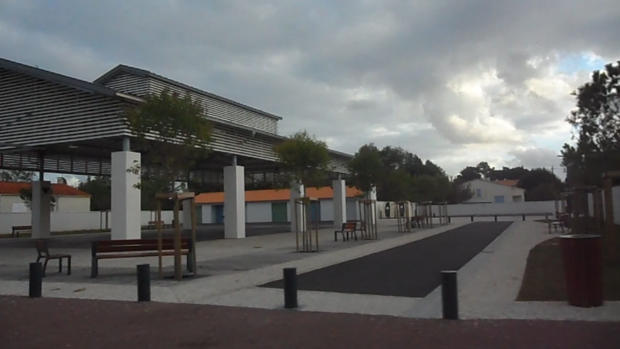 Place du marché d'Arvert.